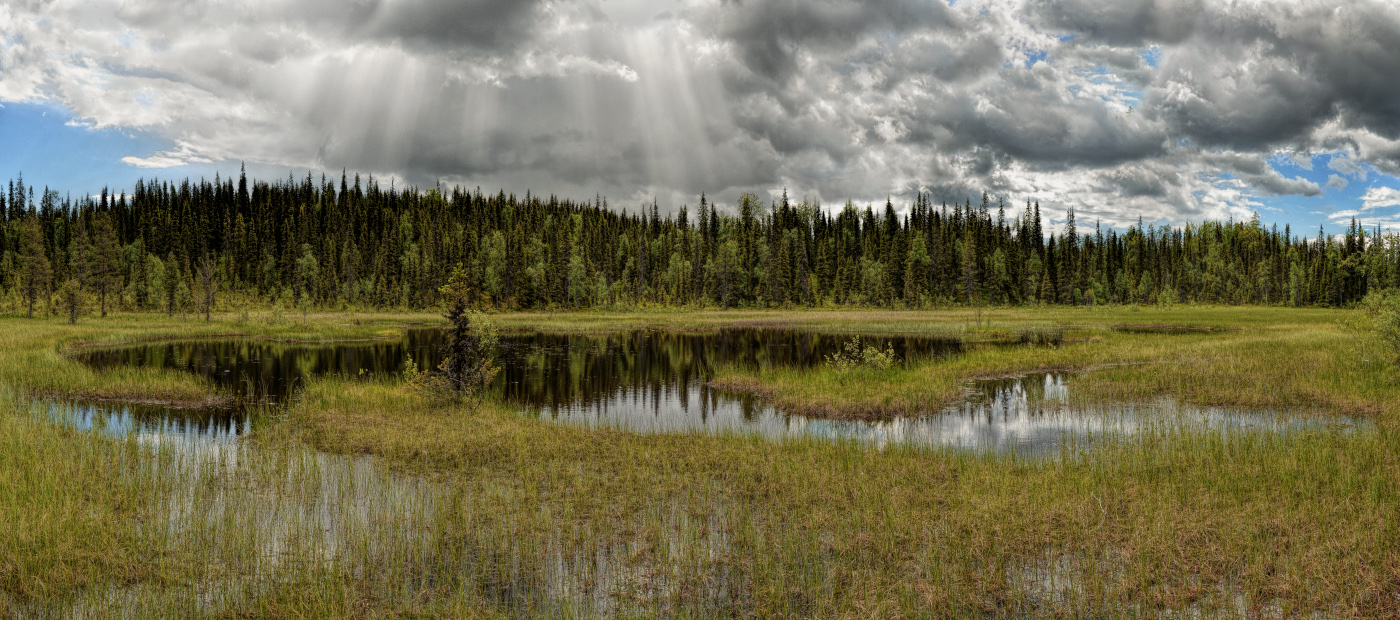 Паанаярви: Западная граница национального парка совпадает с государственной границей России с Финляндией. Со стороны финской границы к “Паанаярви” примыкает национальный парк “Оуланка”,Лоухский район, This image is related to the protected area of Russia number 1000069